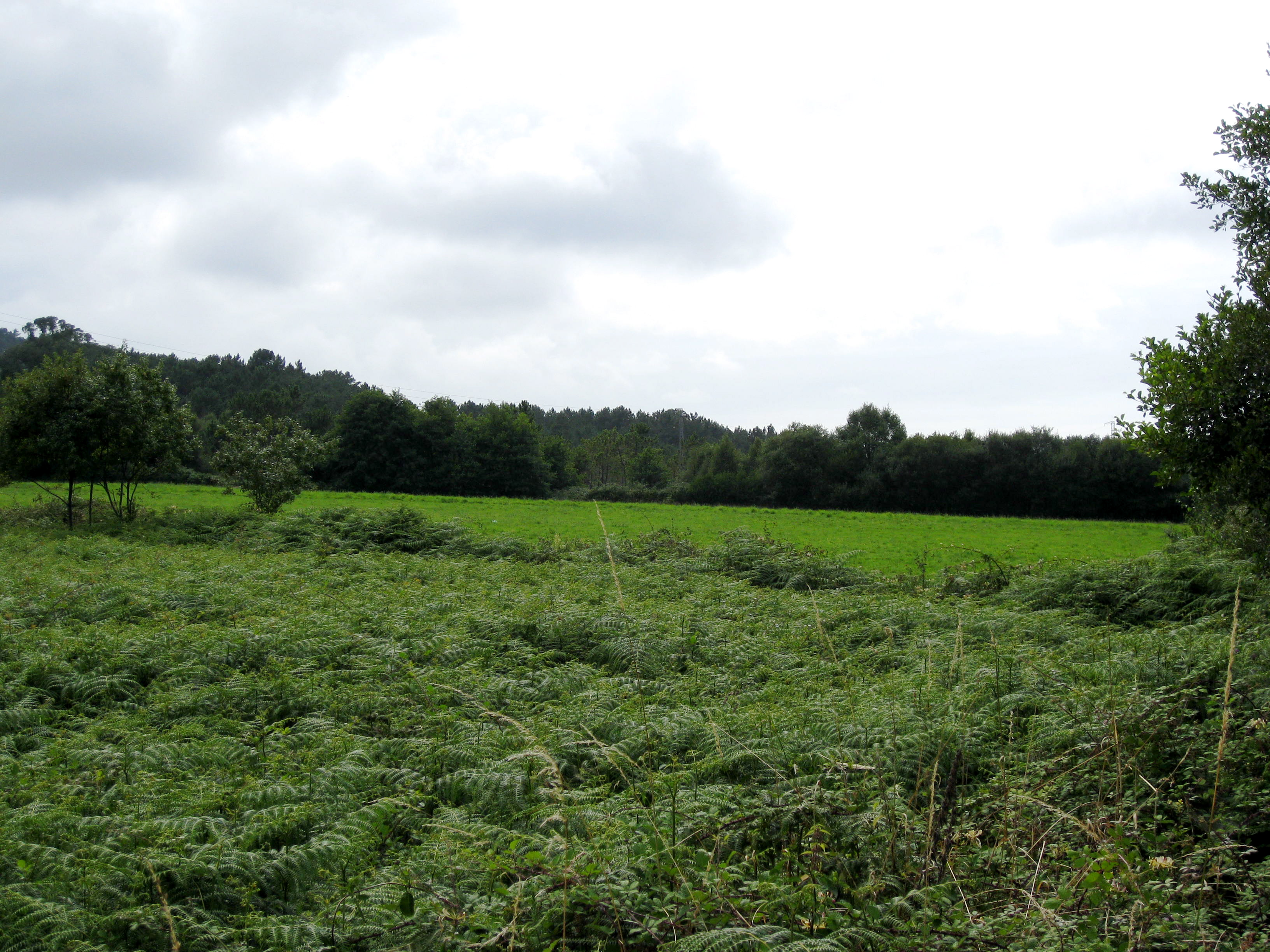 Turbera de Las Dueñas, Cudillero, Asturias